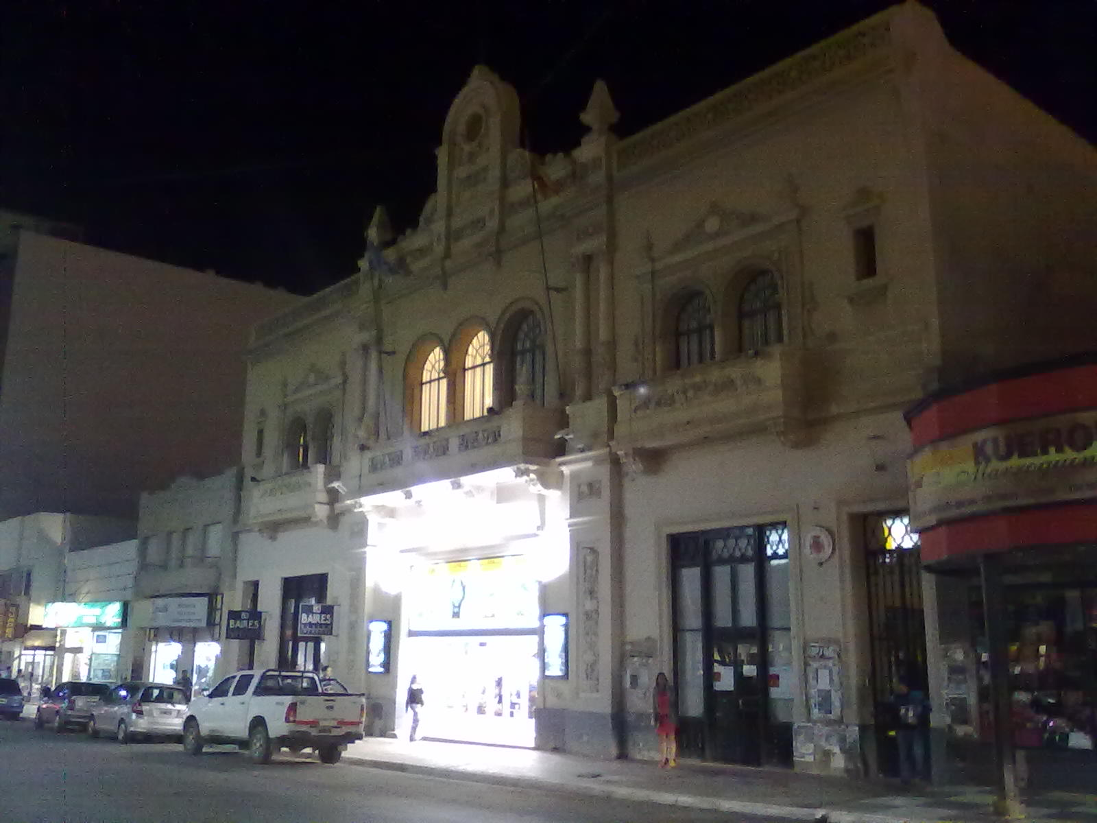 el cine teatro español con su fachada imponenteen la calle princiapal de comodoro